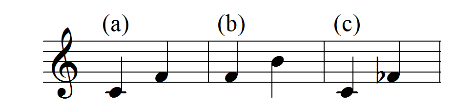 Notenbeispiel Quarten